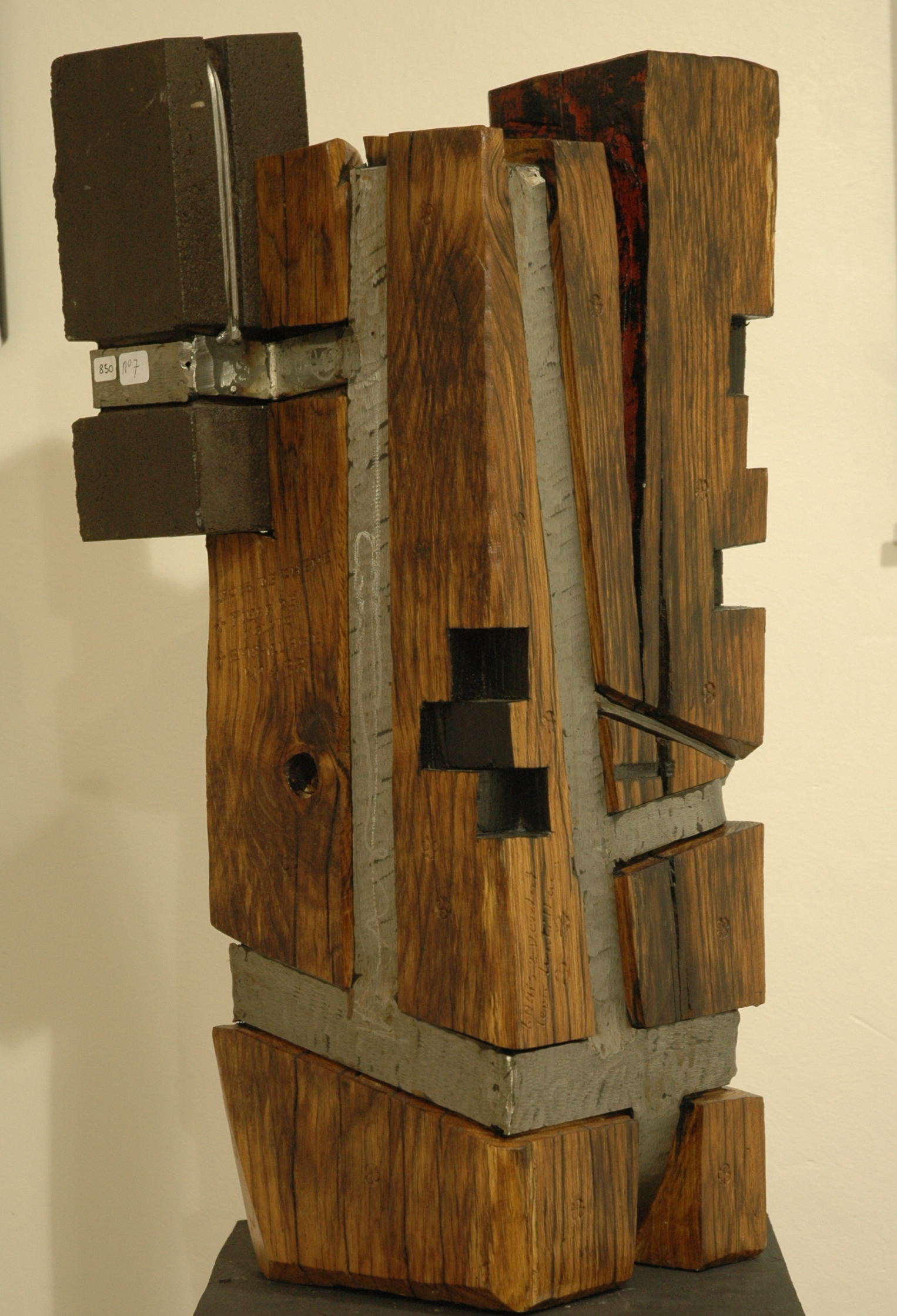 Louis de Verdal (né en 1948), Emballage Bois-Métal, localisation inconnue.